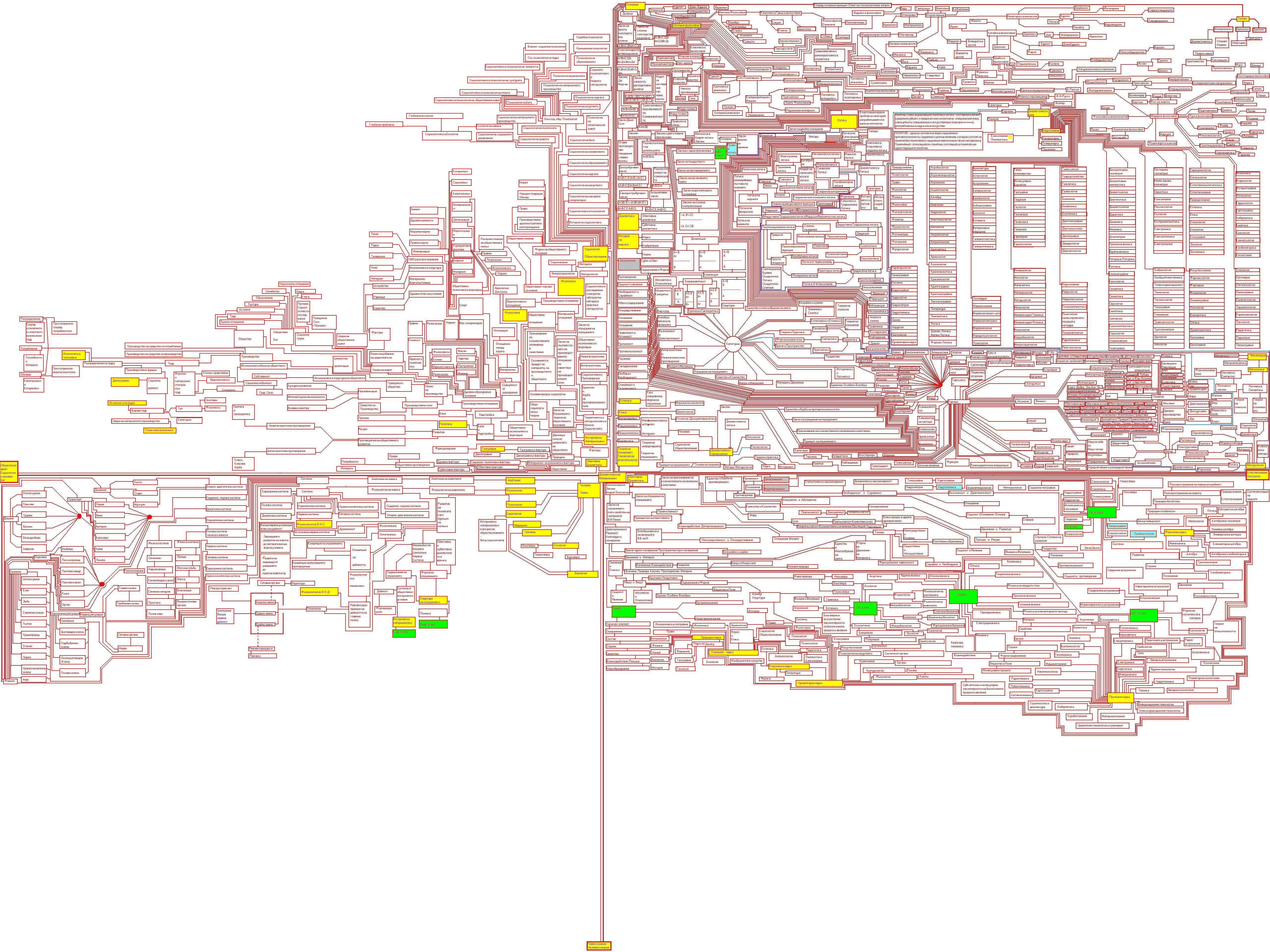 Систематизация на диалектическия материализъм,теория на познанието, онтология, човекознание, исторически материализъм.